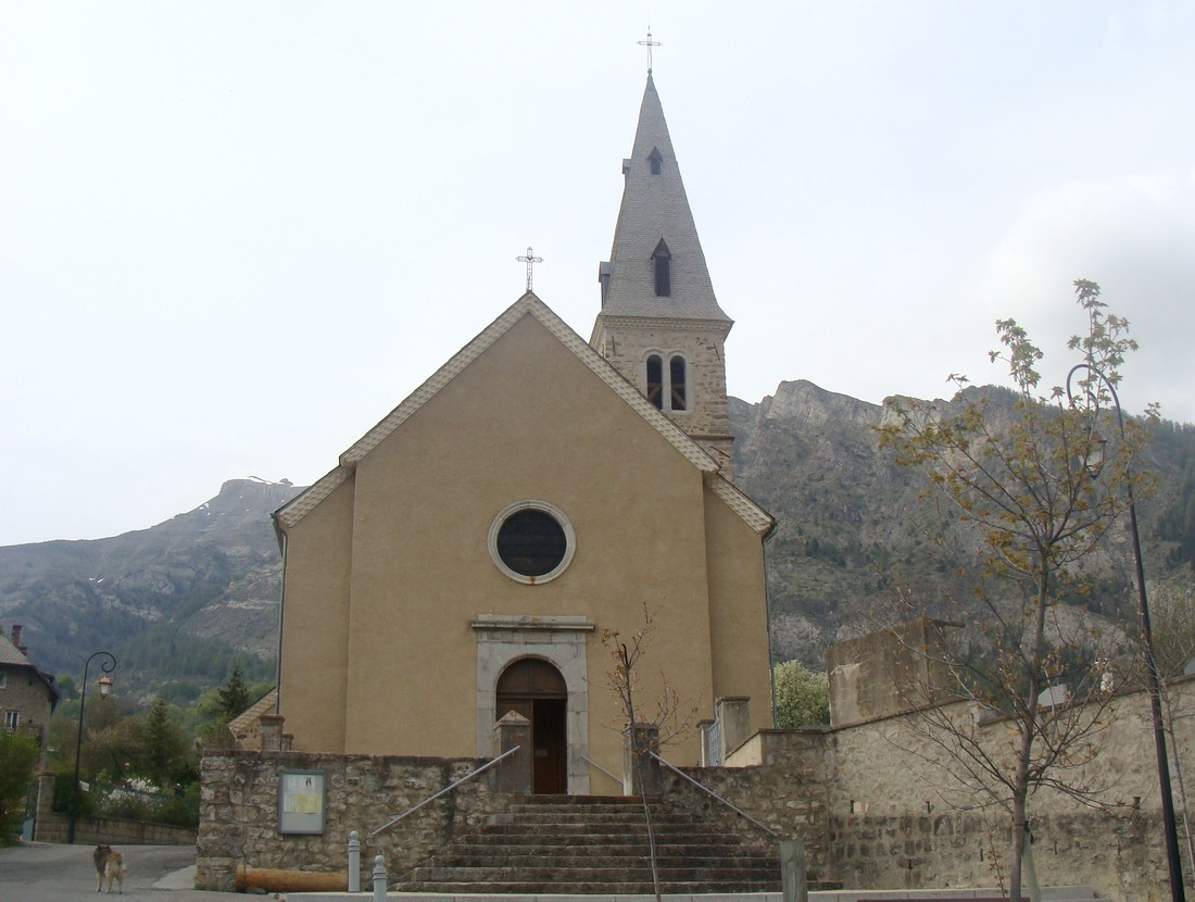 Saint-Jean-Saint-Nicolas (Hautes-Alpes) : l'église paroissiale de Saint-Jean.